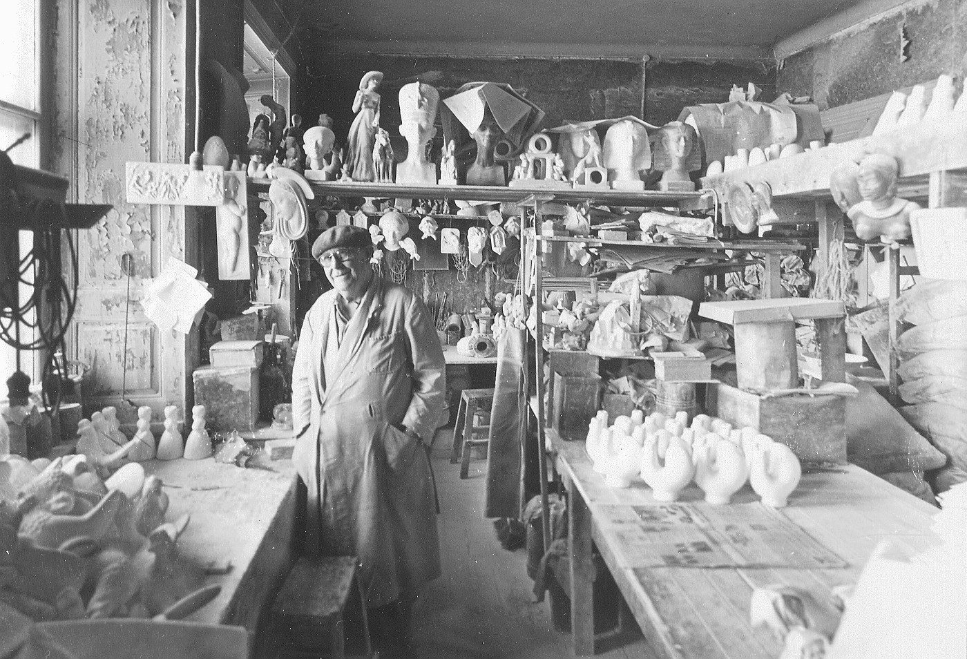 JACOPUCCIS GIPSGJUTERI 1968, Bastugatan 6